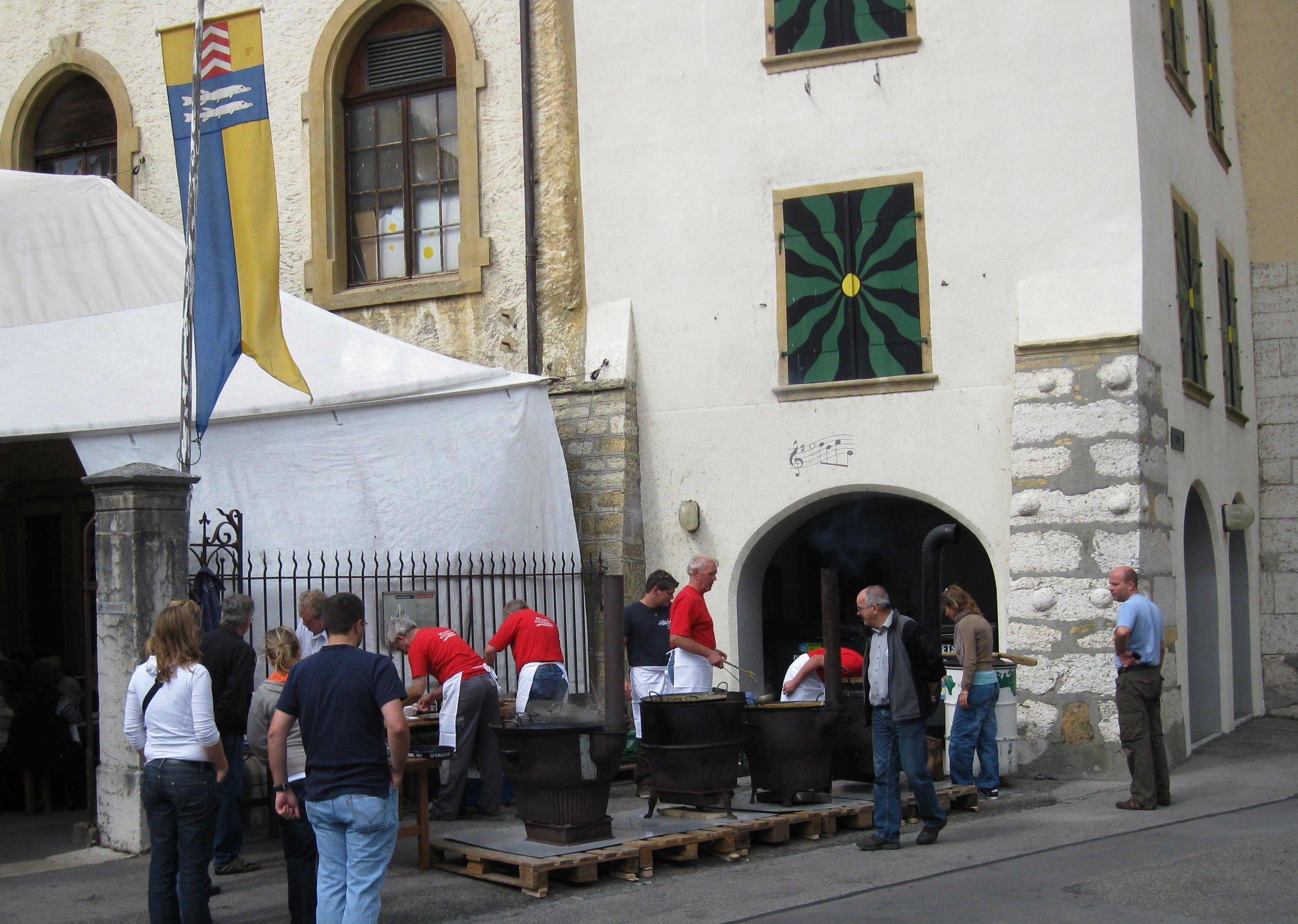 musikgesellschaft anlässlich bürgertag solothurn 2009